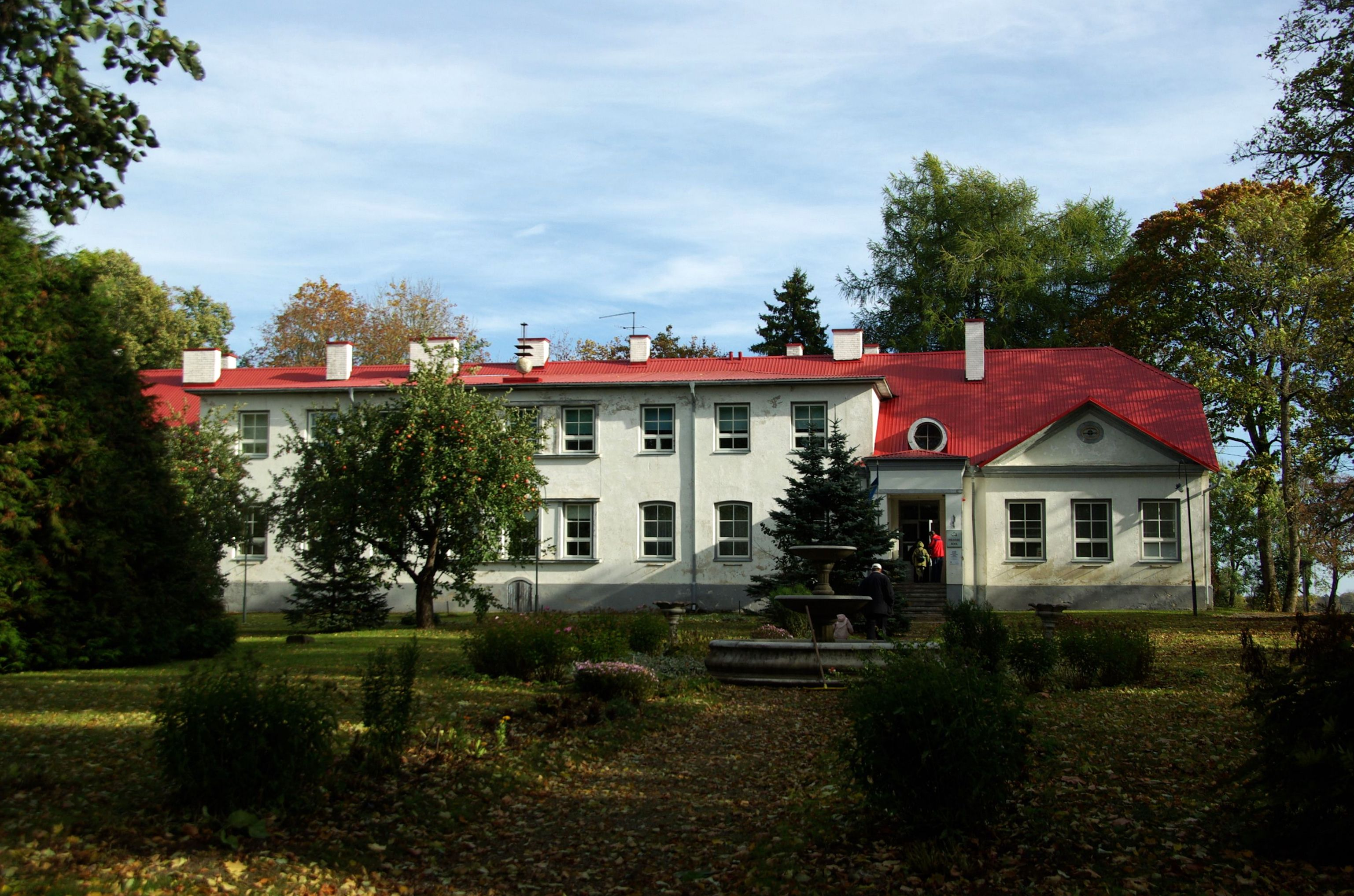 Harju maakond,Raasiku vald,Pikavere küla